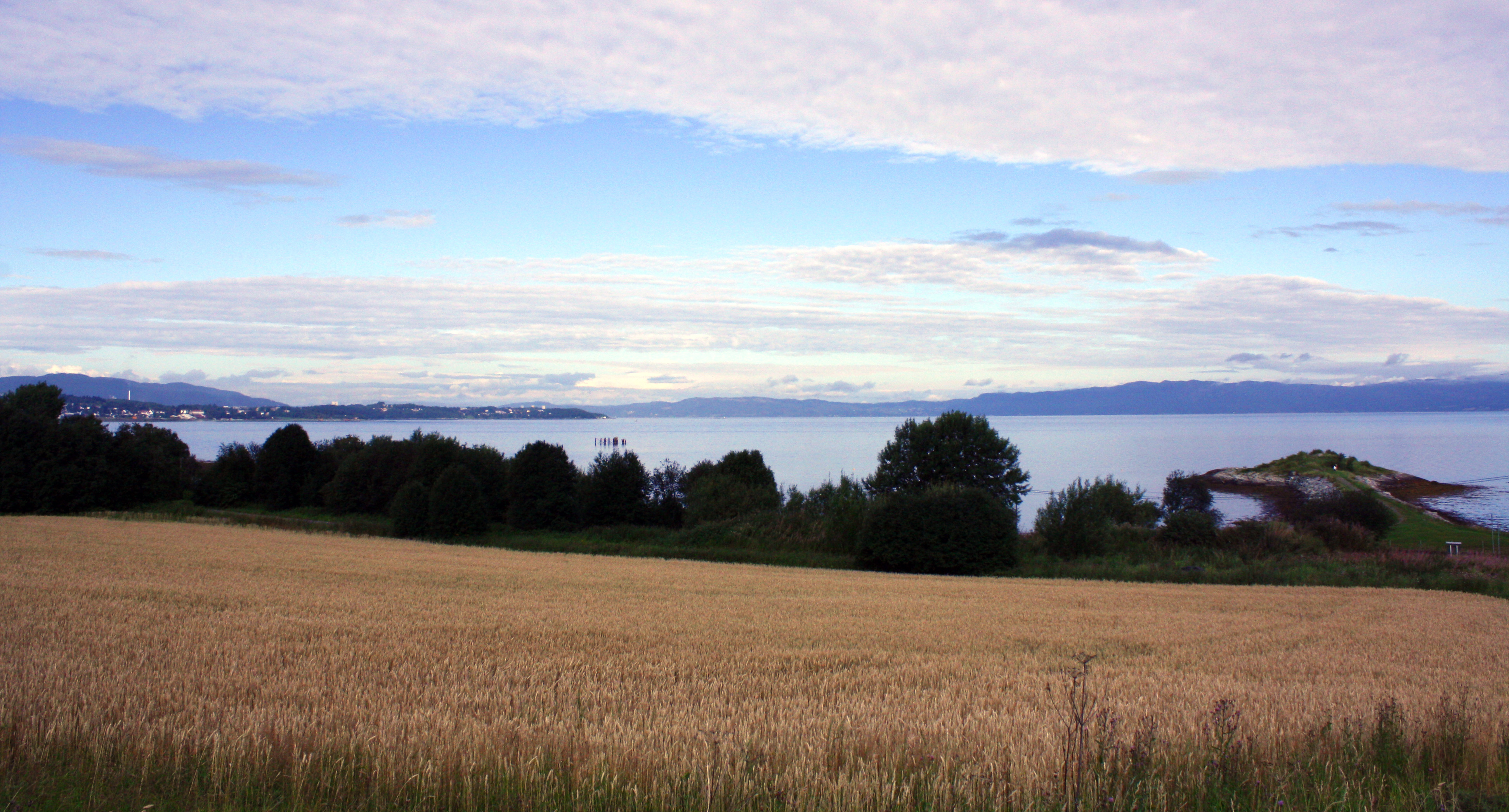 Være er et av alternativene for lokalisering for logistikknutepunkt ved valg av konseptet Integrert Øst.